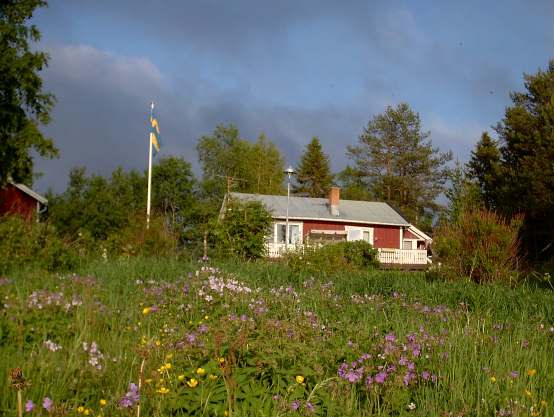 Sommarstuga i Västerbotten